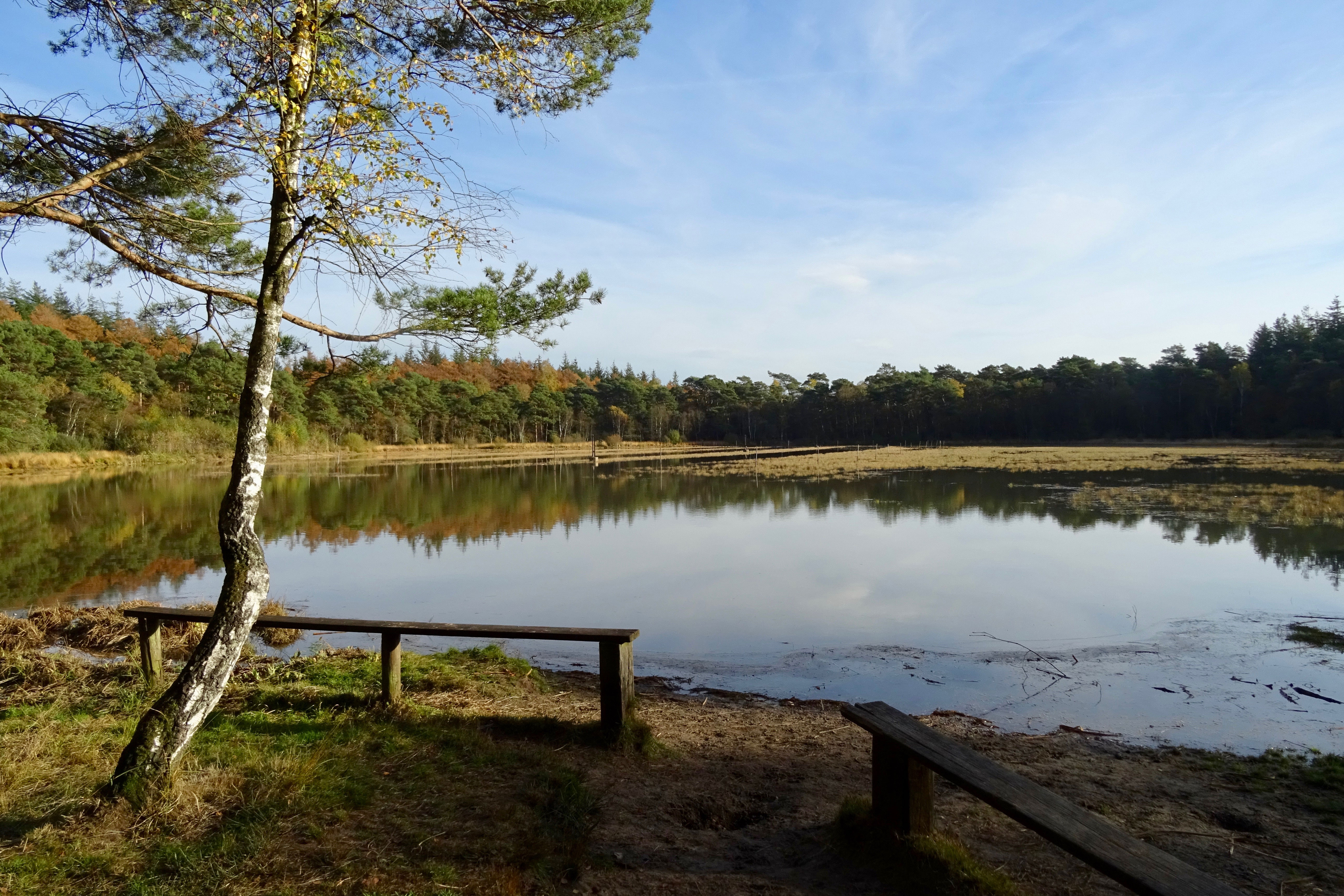 De Wite Mar (Witte Meer) in het Alpherbosch